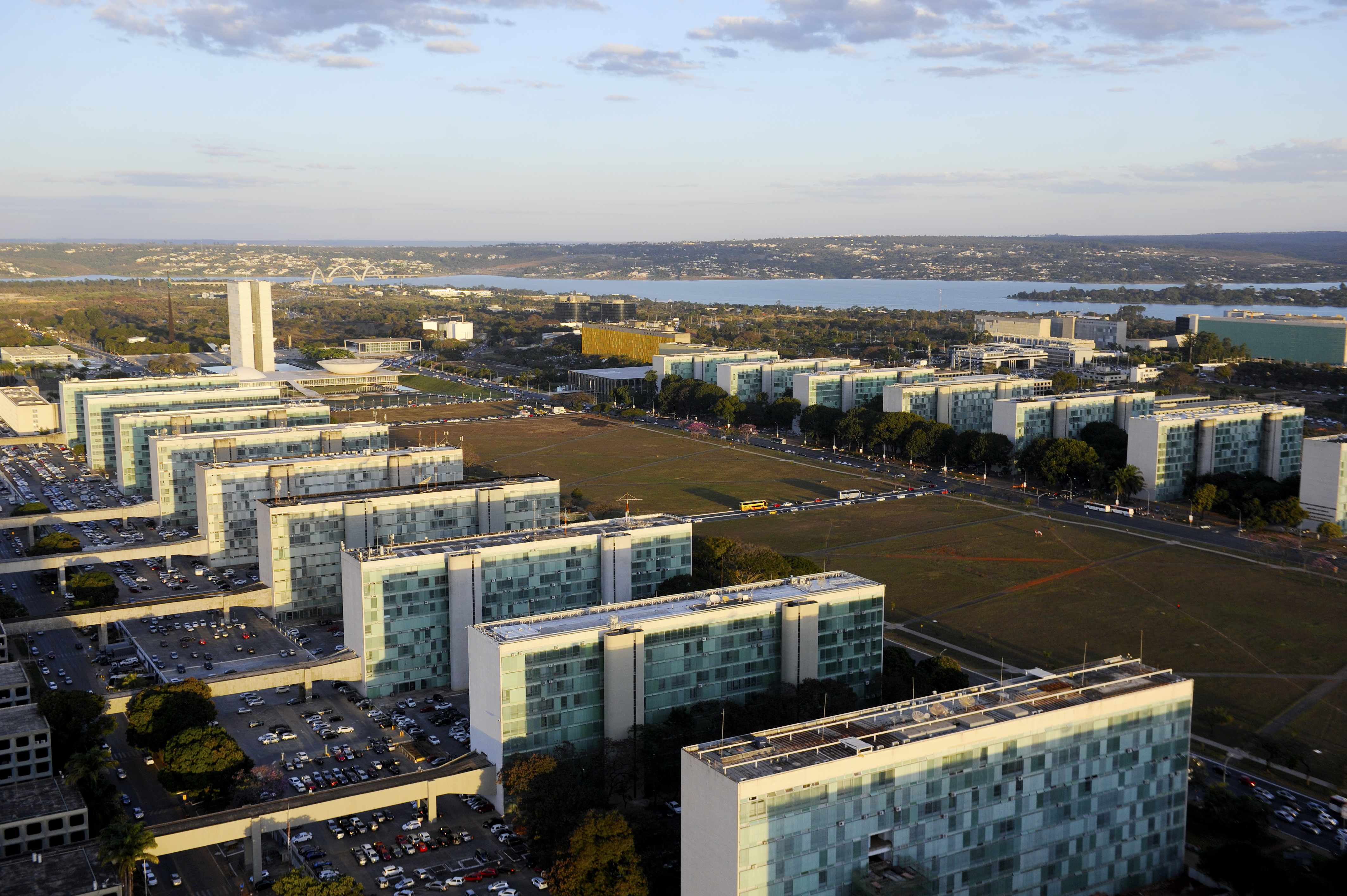 Vista aérea da Esplanada dos Ministérios em Brasília-DF. Foto: Ana Volpe/Agência Senado